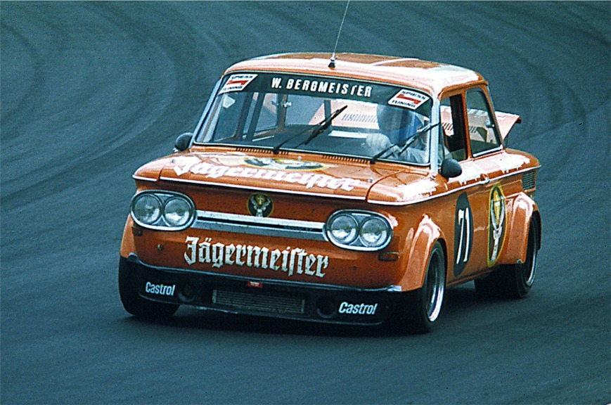 NSU TT auf dem Nürburgring, Südkehre, gefahren von Willi Bergmeister.